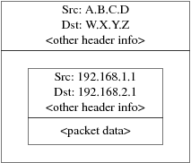 Монгол: Ipsec-encap-pkt